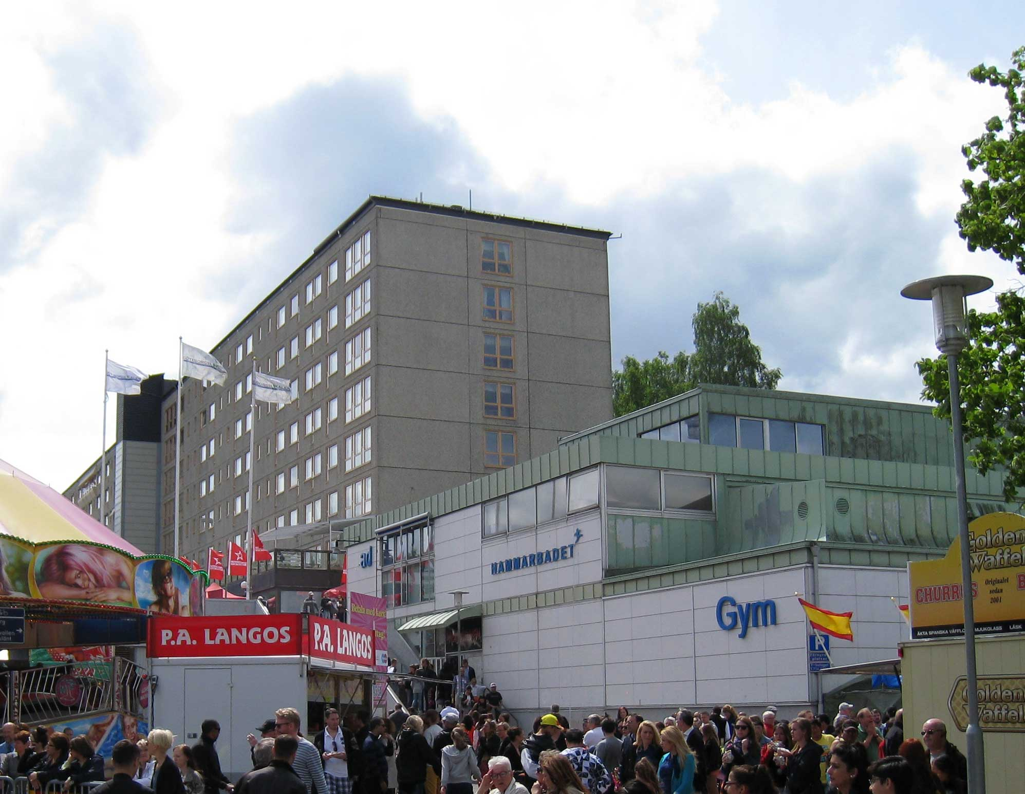 Hammarbadet, Hammarkullen, Göteborg